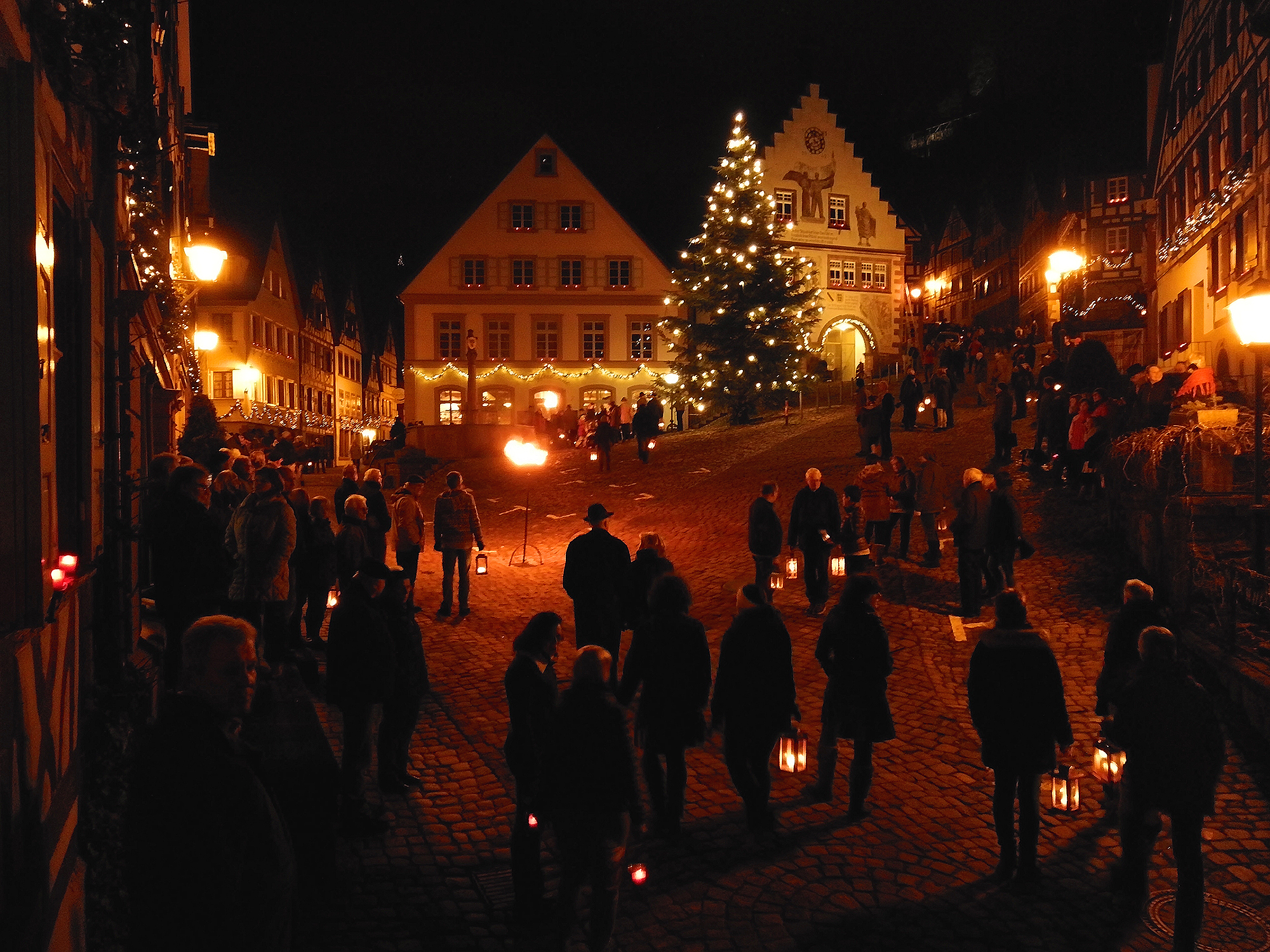 Silvesterzug in Schiltach bei der Versammlung der Teilnehmer